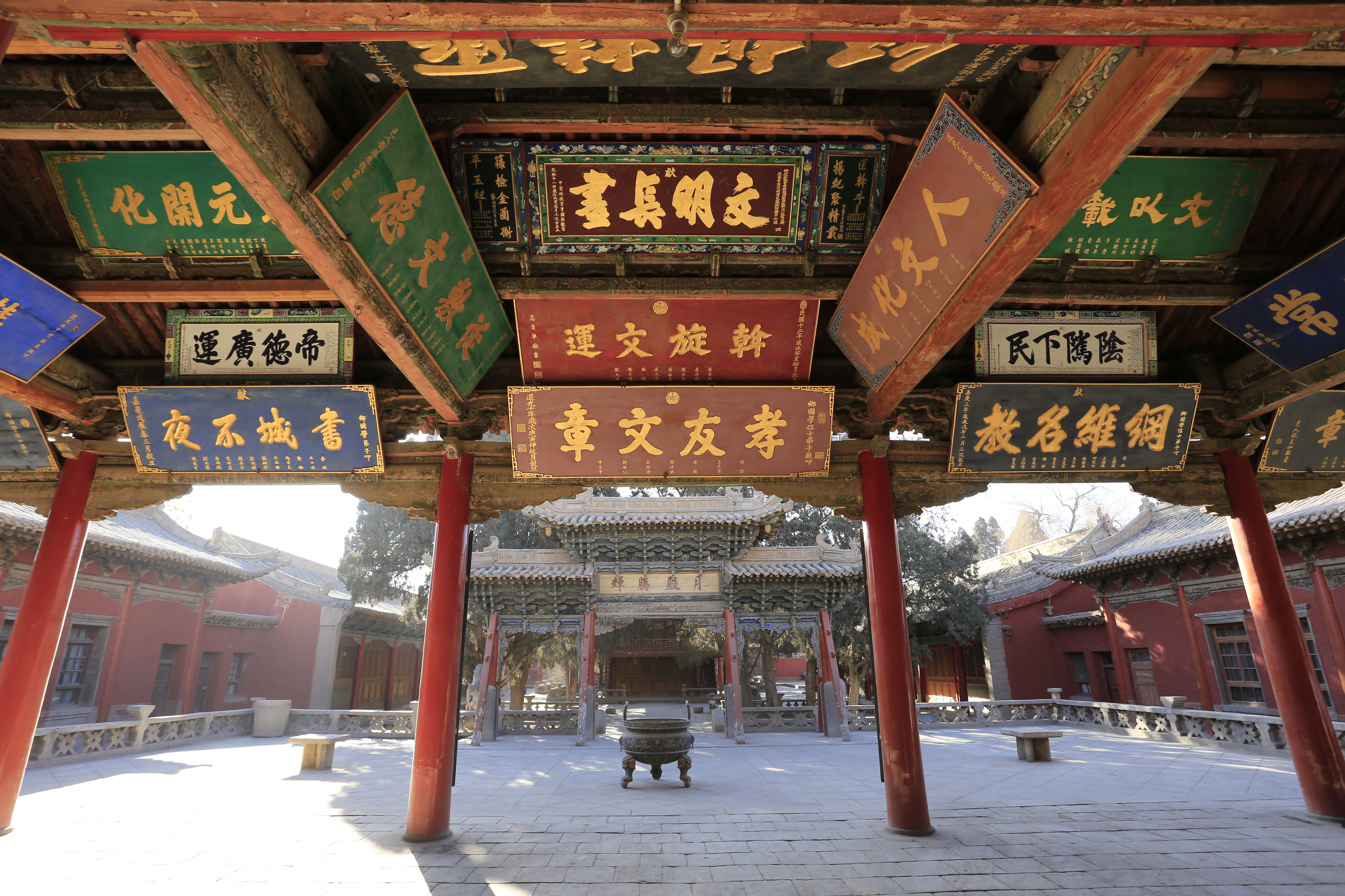 武威文庙 文昌宫桂籍殿